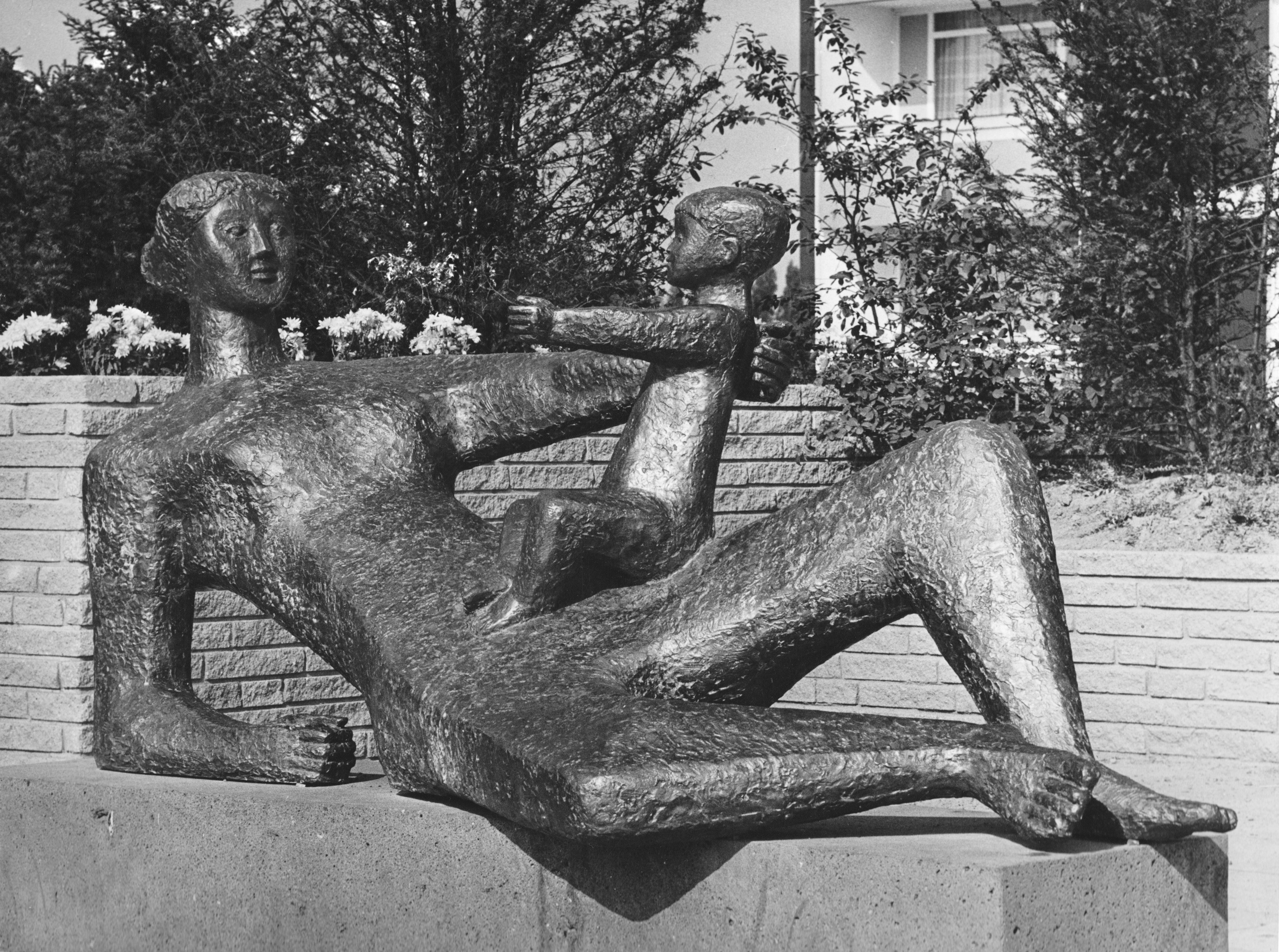 Liegende mit Kind (1971) von Prof. Hans Breker